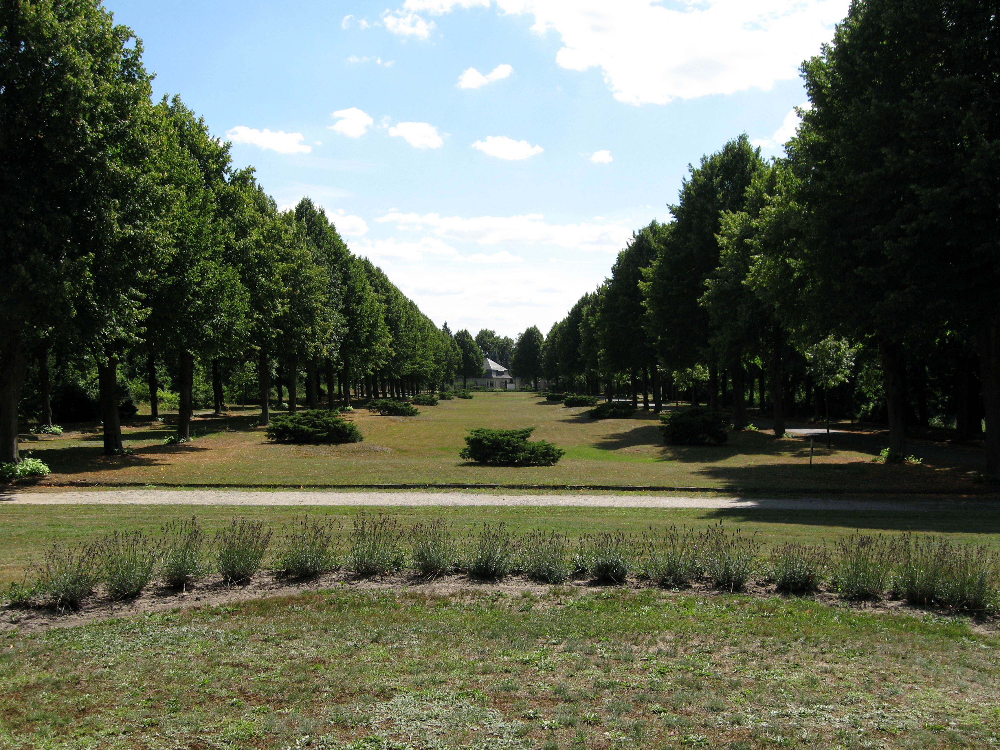 Hauptachse des Ostkirchhofs Ahrensfelde, Landkreis Barnim, Land Brandenburg, Deutschland